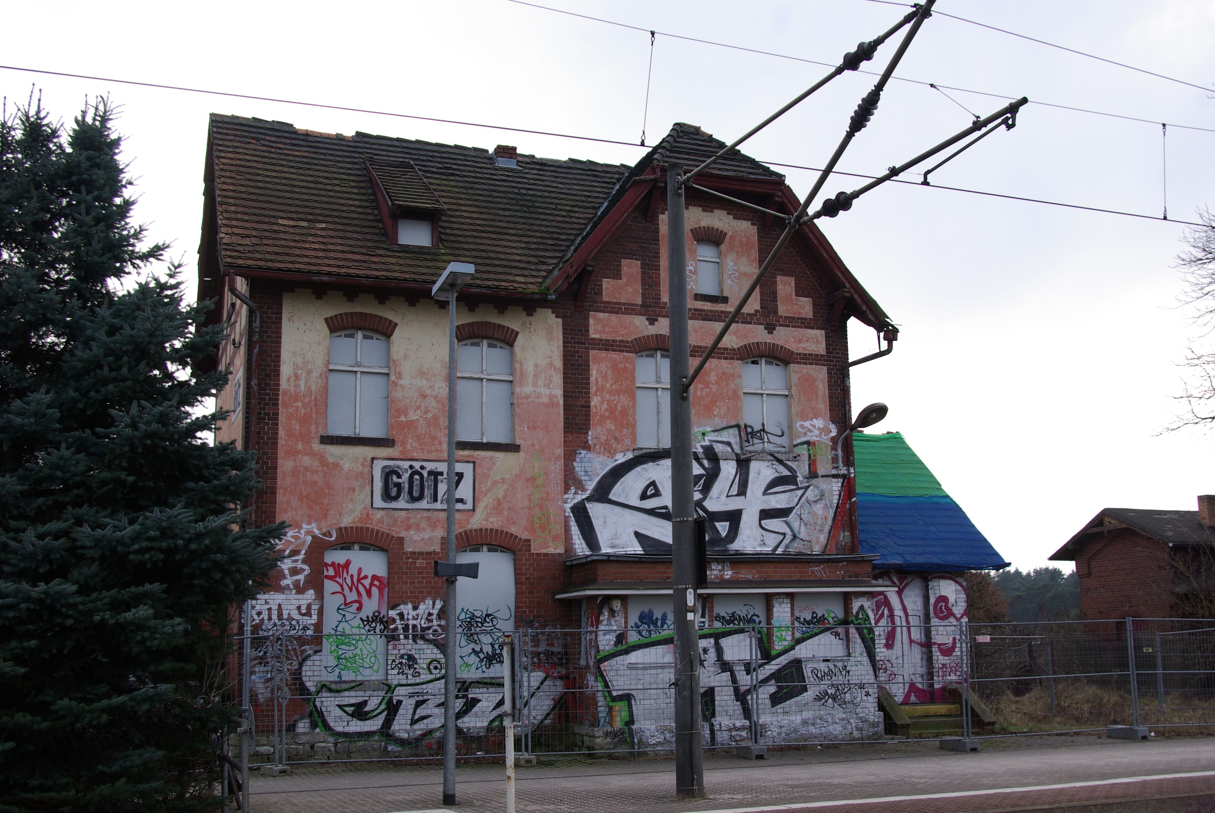 Groß Kreutz, Ortsteil Götz in Brandenburg. Der Bahnhof des Ortsteils Götz. Die Bahnstrecke ist noch in Betrieb. Der Bahnhof steh unter Denkmalschutz.